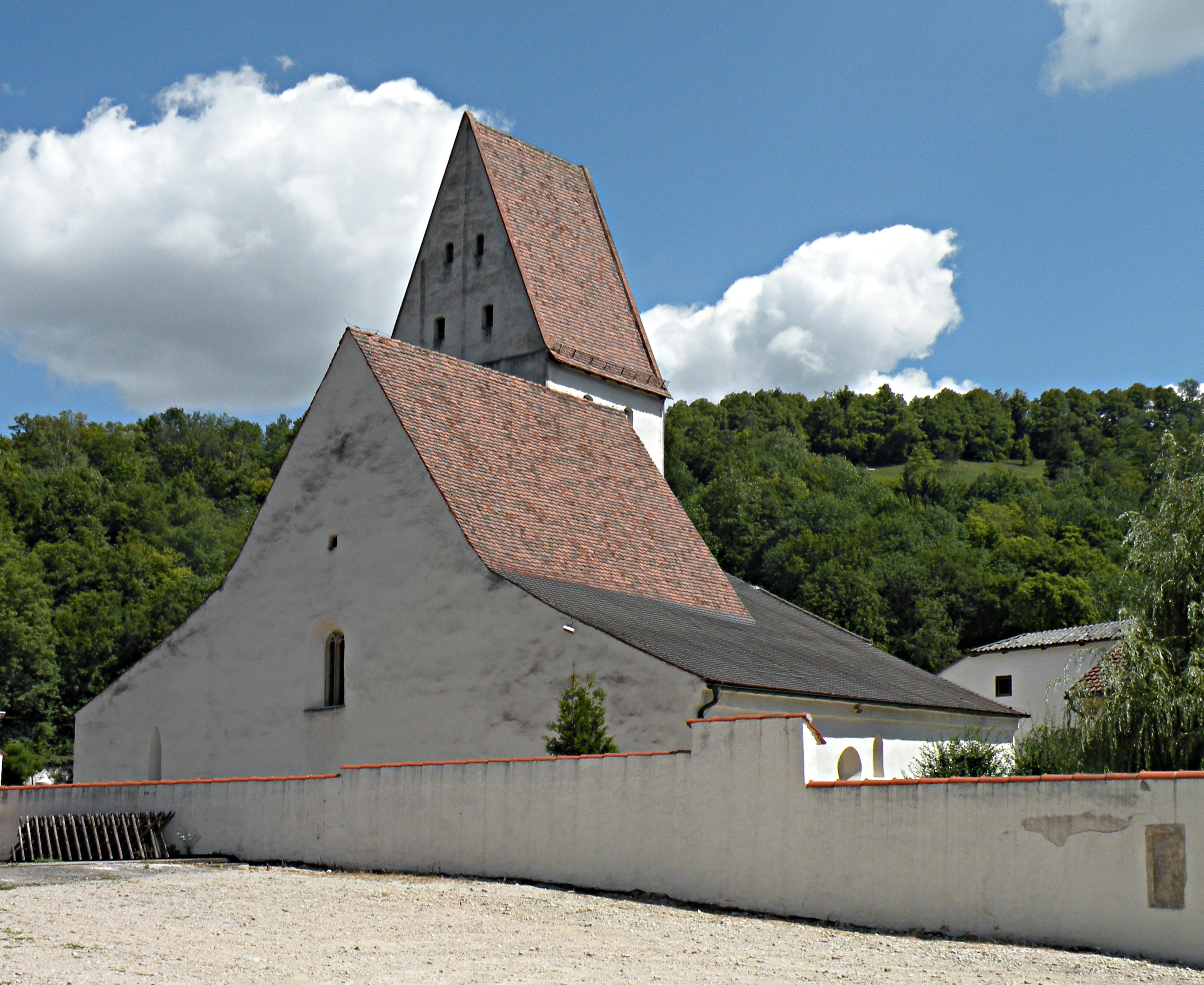 Galluskirche._Pottenstein